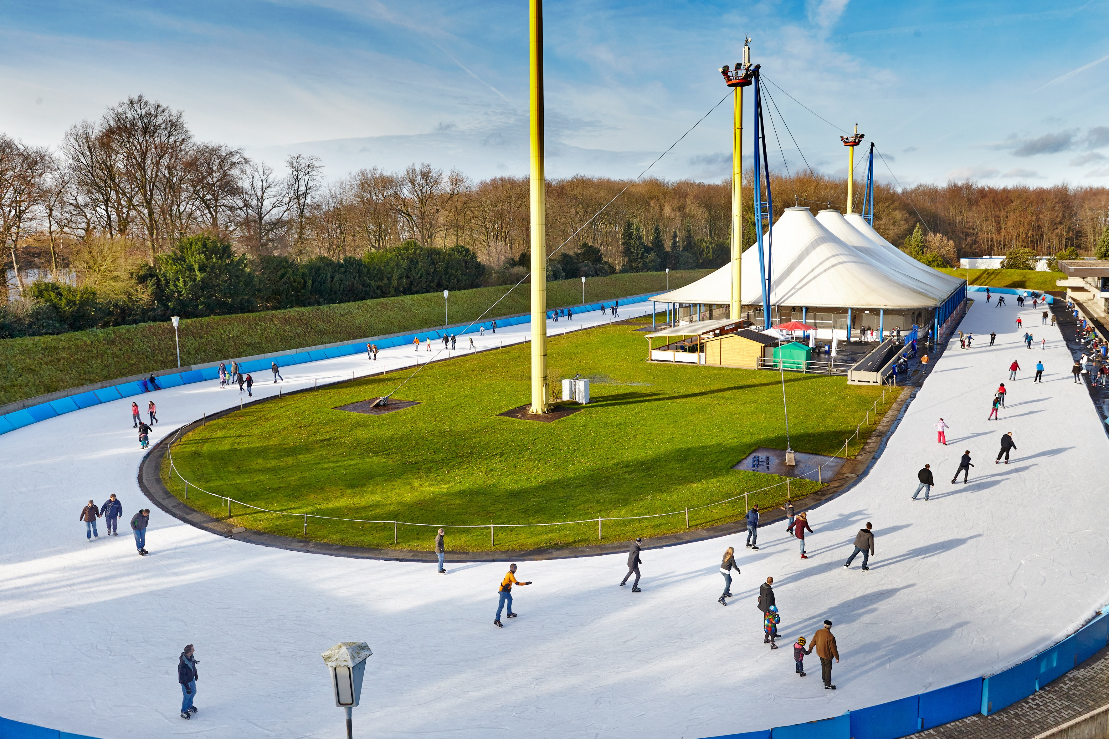 400m-Außenbahn des Grefrather EisSport & EventParks